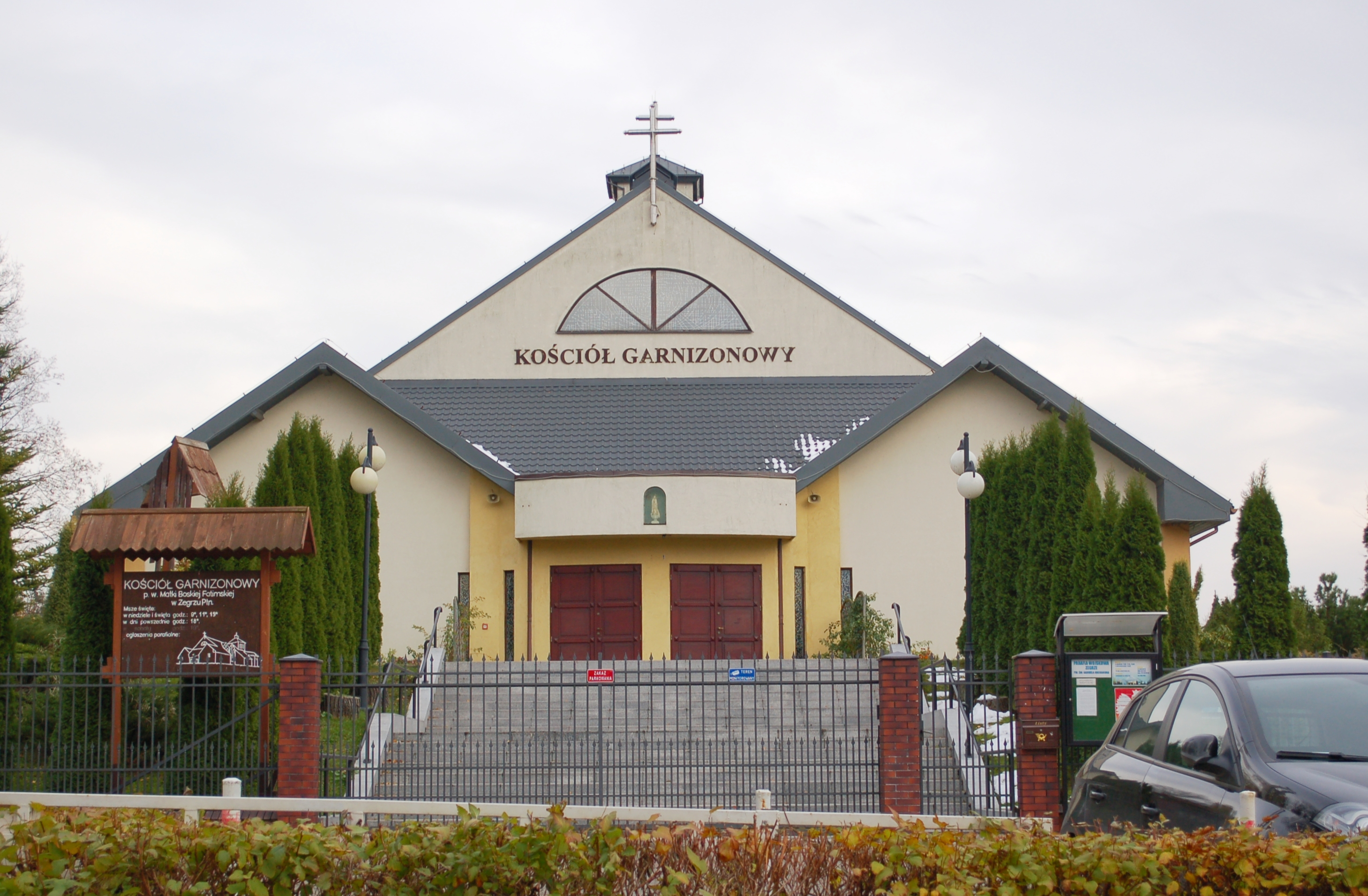 Zegrze Church